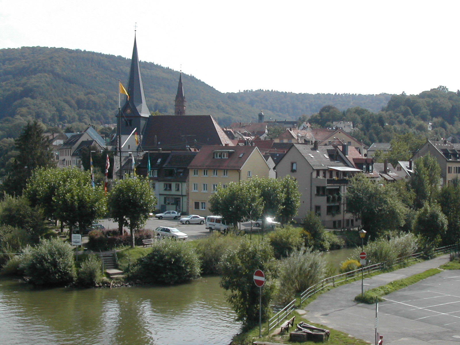 69151 Neckargemünd/Germany